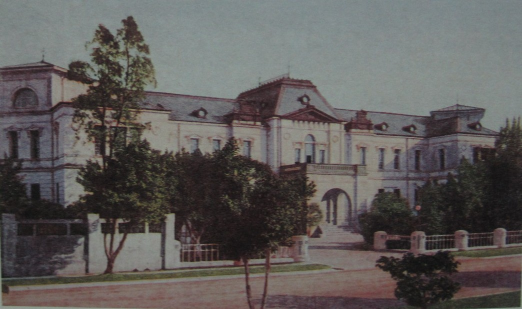 臺灣總督府中央研究所